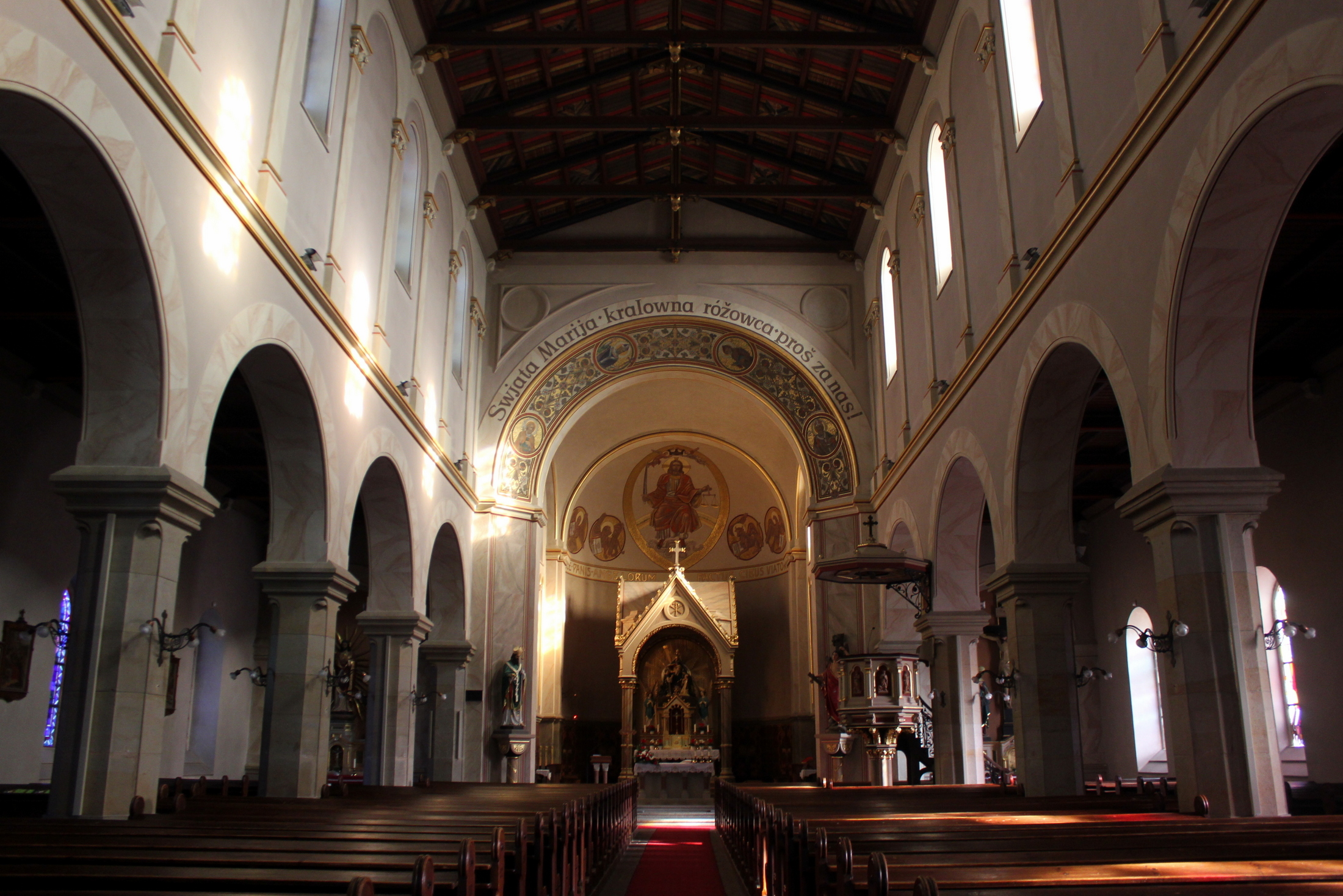 Hornjoserbsce: Cyrkej swj. Marije, kralowny róžowca w Radworju; srjedźna łódź z wołtarjom.